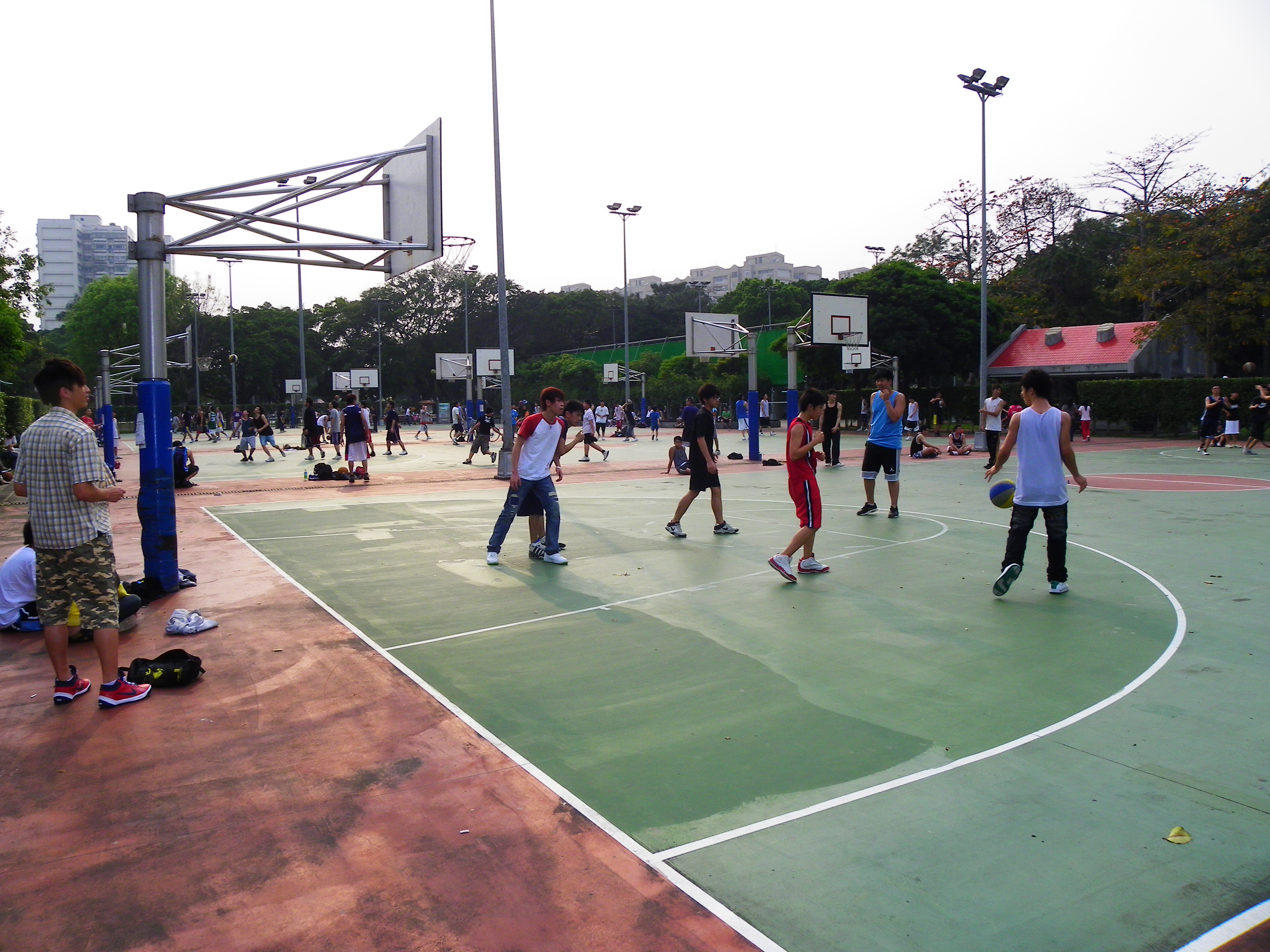 假日下午，在臺北市青年公園籃球場打籃球的青少年。